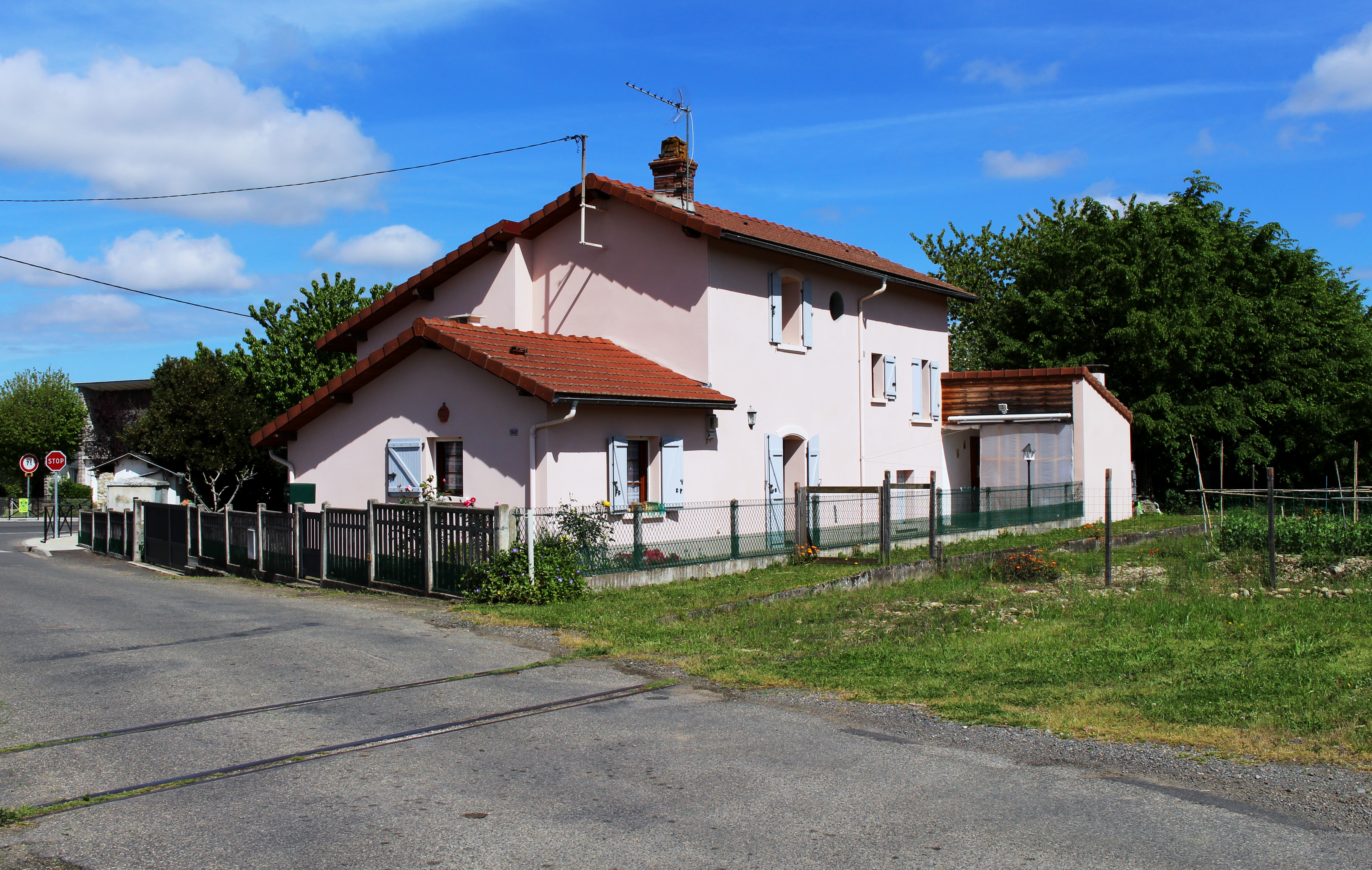 Passage à niveau de Bernac-Debat (Hautes-Pyrénées)